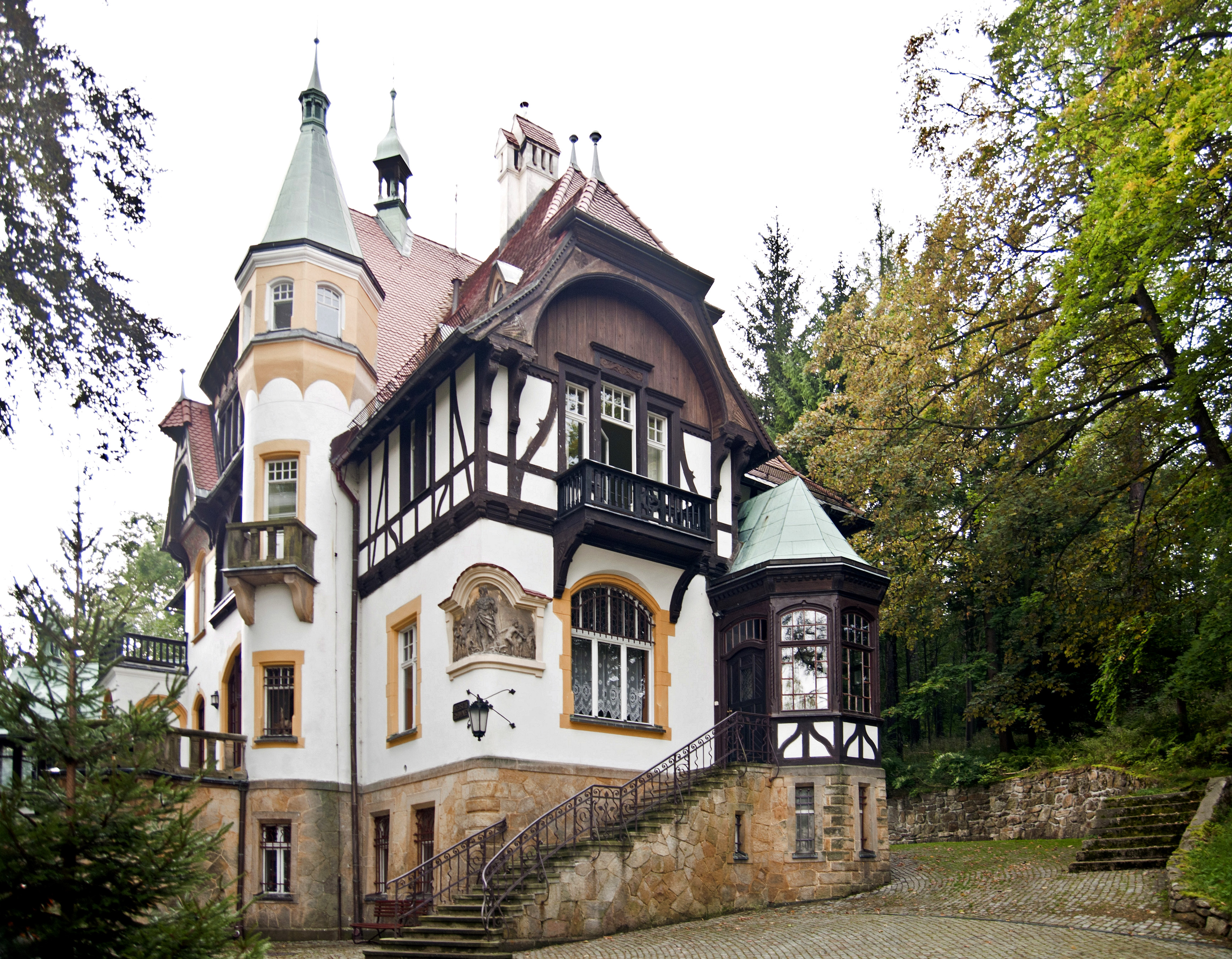 Oficyna, ob. dom wypoczynkowy MARZENIE II przy willi PINTSCH, ob. dom wypoczynkowy MARZENIE I.